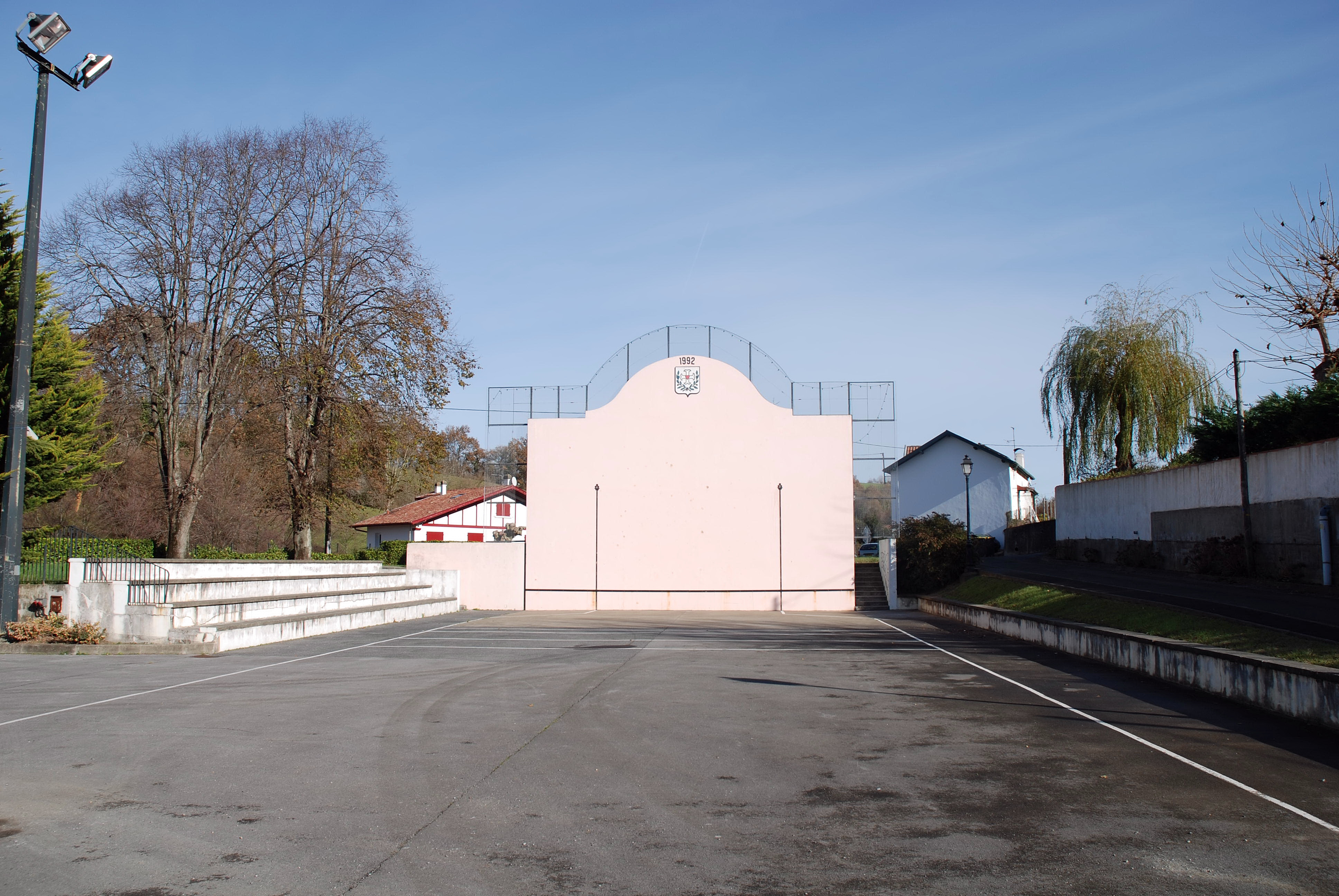 Hasparren, dans le quartier d'Urcuray, le fronton place libre. Photo prise le 31/12/06 par Harrieta171